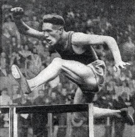 Yves Cros, 4e du championnat d'Europe 1946 à Oslo sur 400 m. haies.